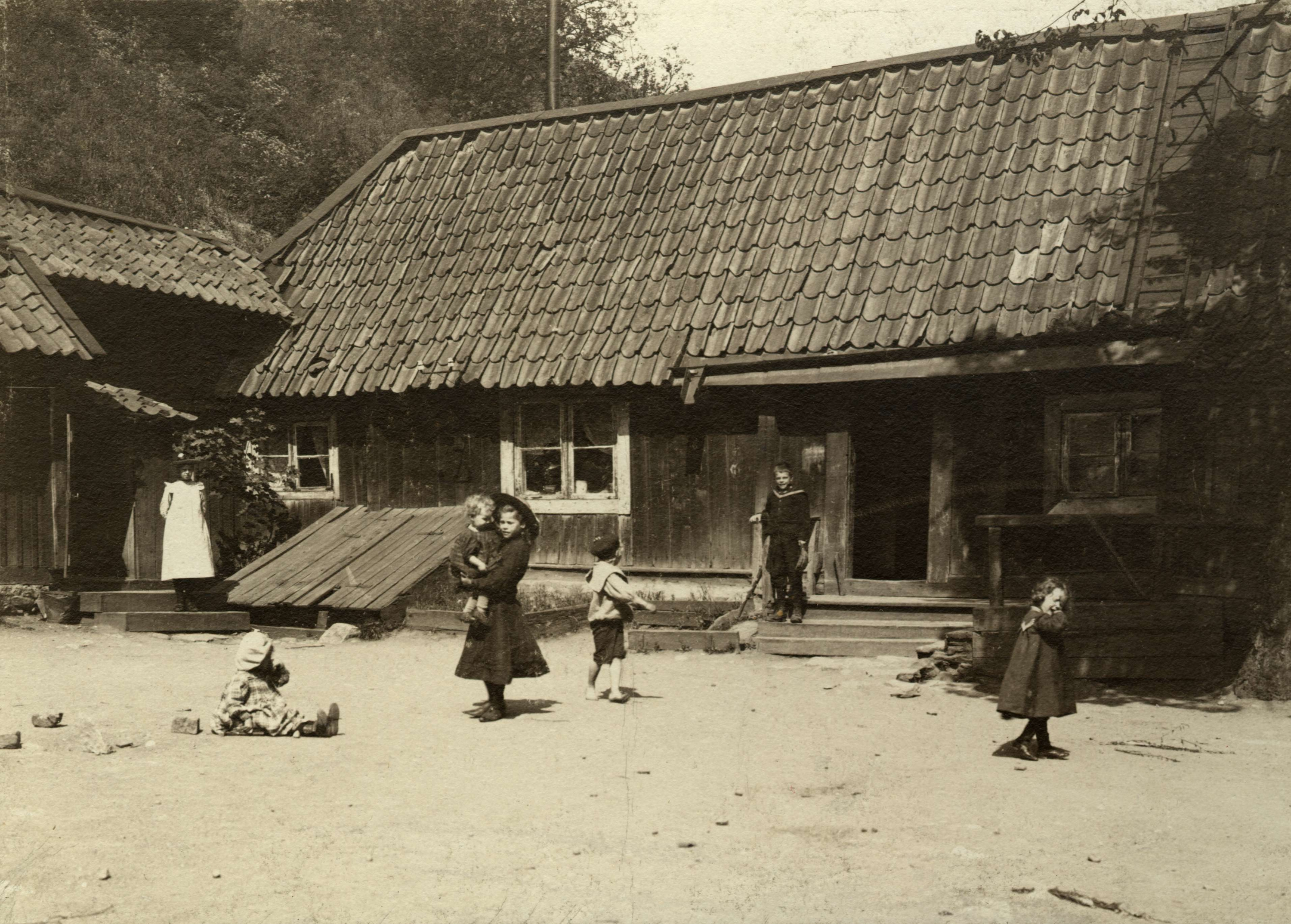 Barn på gården vid Saltmätaregatan 23, Stockholm. Edvard Bäcklin 1903.